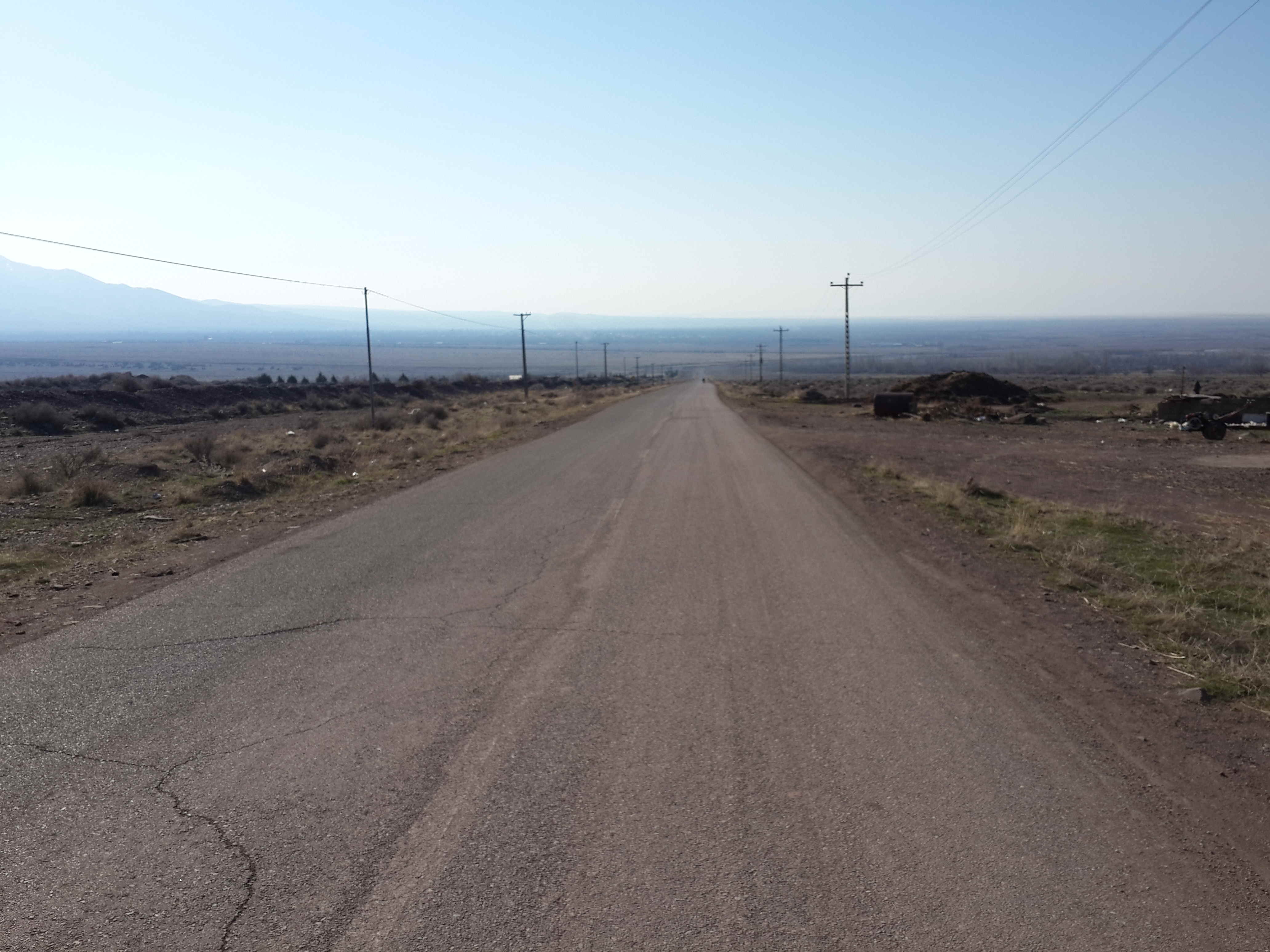 جاده منتهی به تسوج